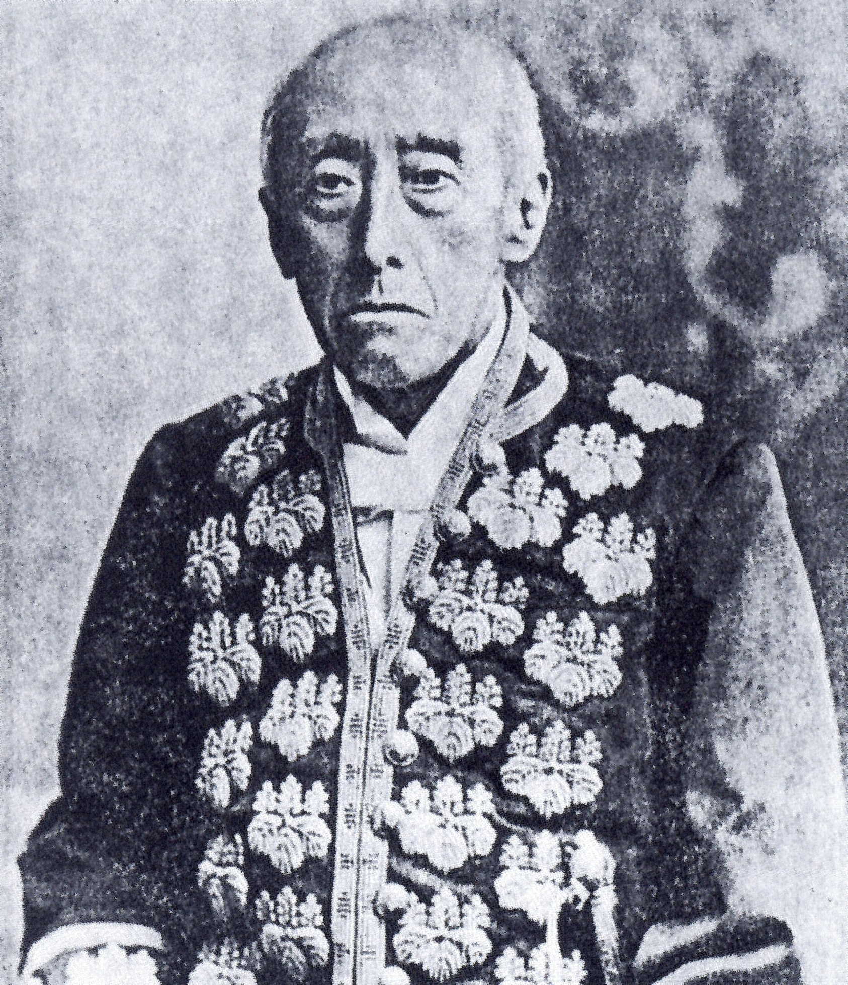 井上正直の肖像。